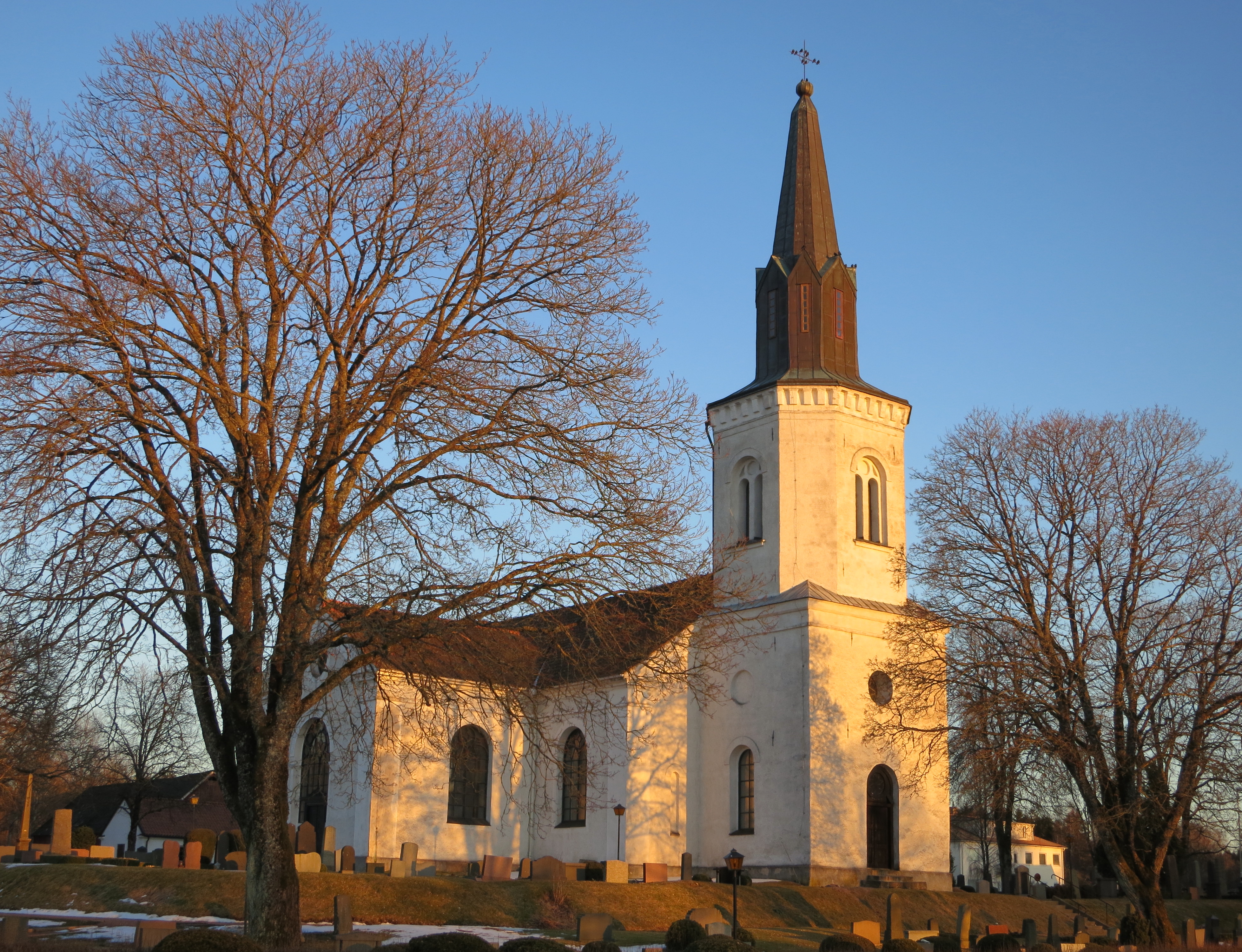 Oderljunga kyrka